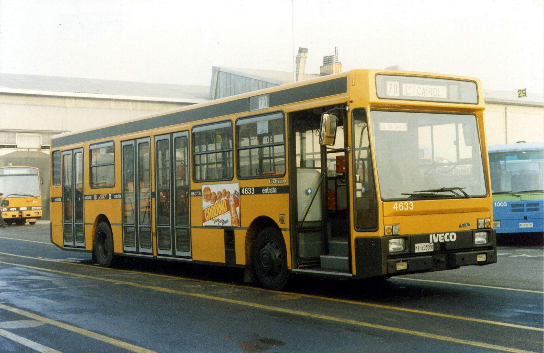 Autobus 4633 dell'ATM di Milano, modello Iveco 471.12 U-Effeuno - III serie (n. 4600-4666)